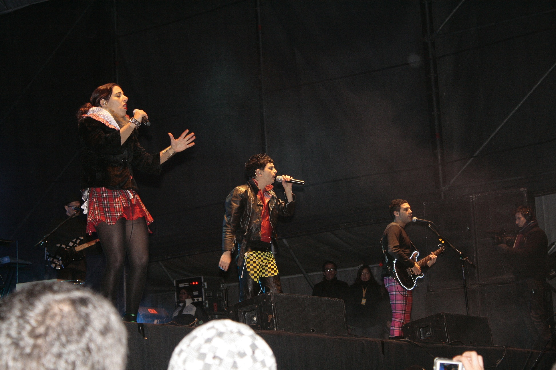 Miranda! dando un concierto en 2011.